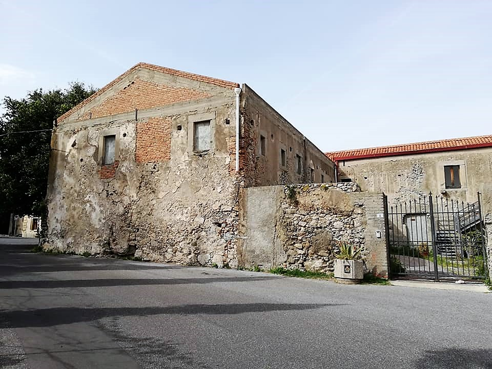 Chiesa di Santa Maria dell'Itria e convento dei Cappuccini.